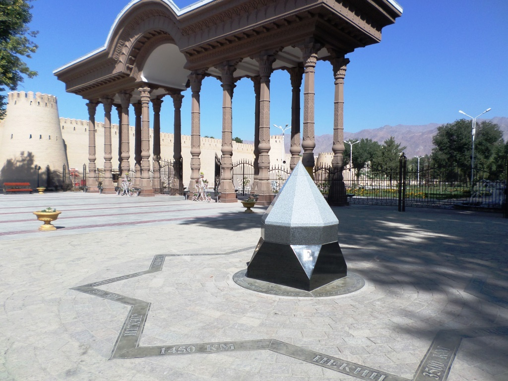 Арка у входа в парке имени К. Худжанди, г. Худжанд, 2015 год